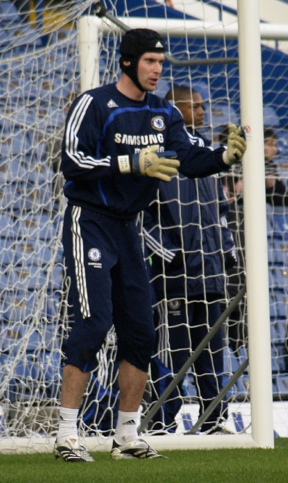 Petr Čech